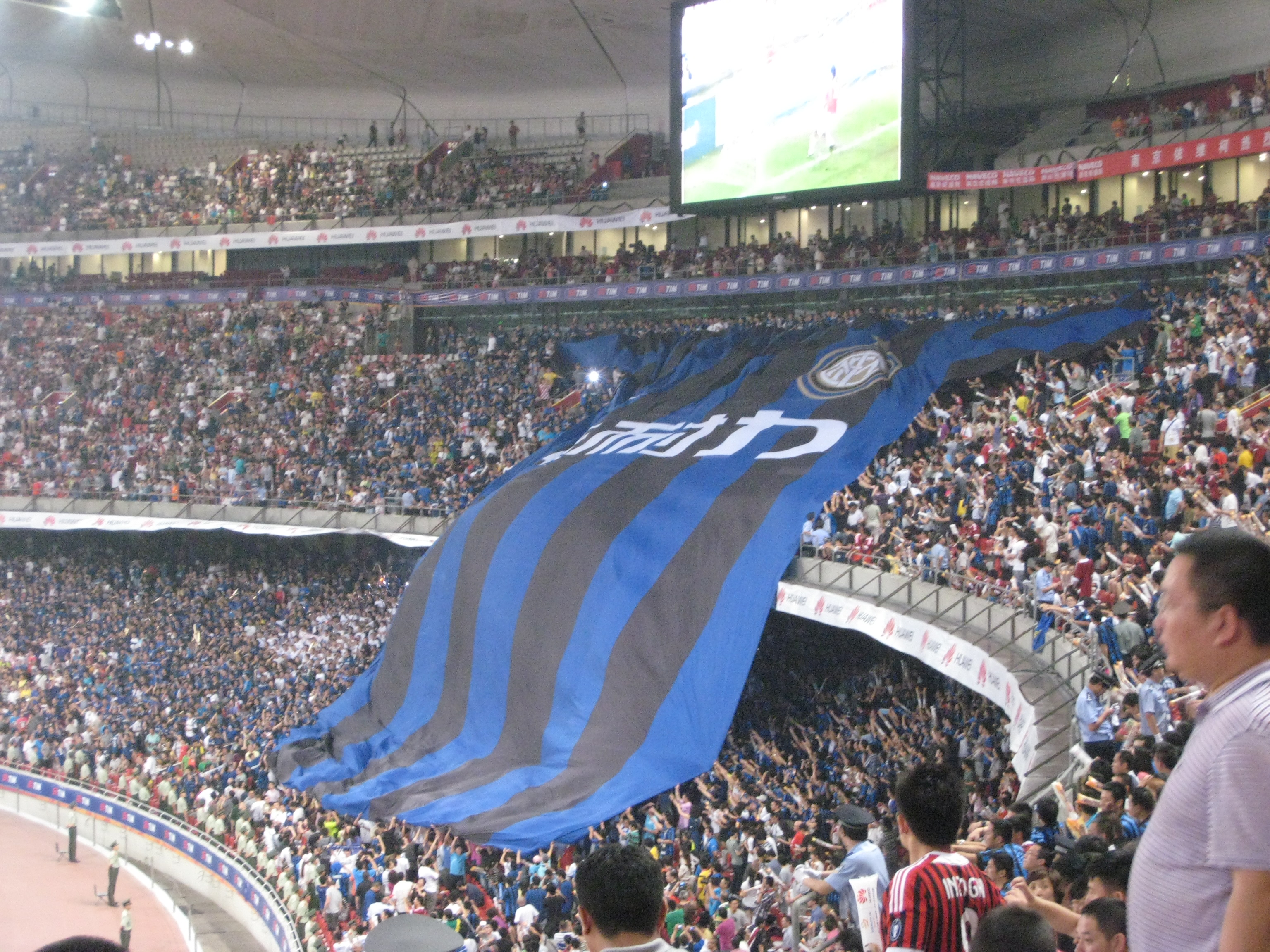 2011 Italia Super Cup in Beijing 2011北京意大利超级杯赛